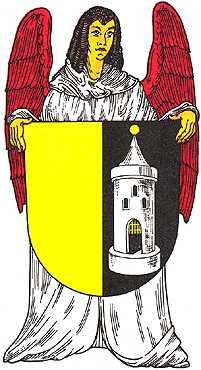 znak města Verneřice